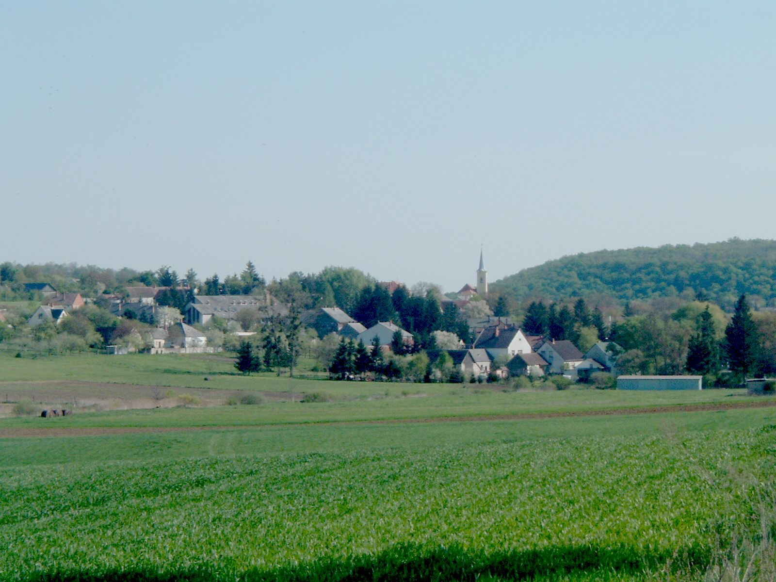 Felsőcsatár,Hungary